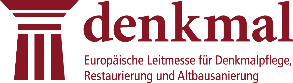 Logo der Messe denkmal 2016